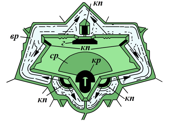 План бриальмоновского форта постройки 1859-1864 гг.